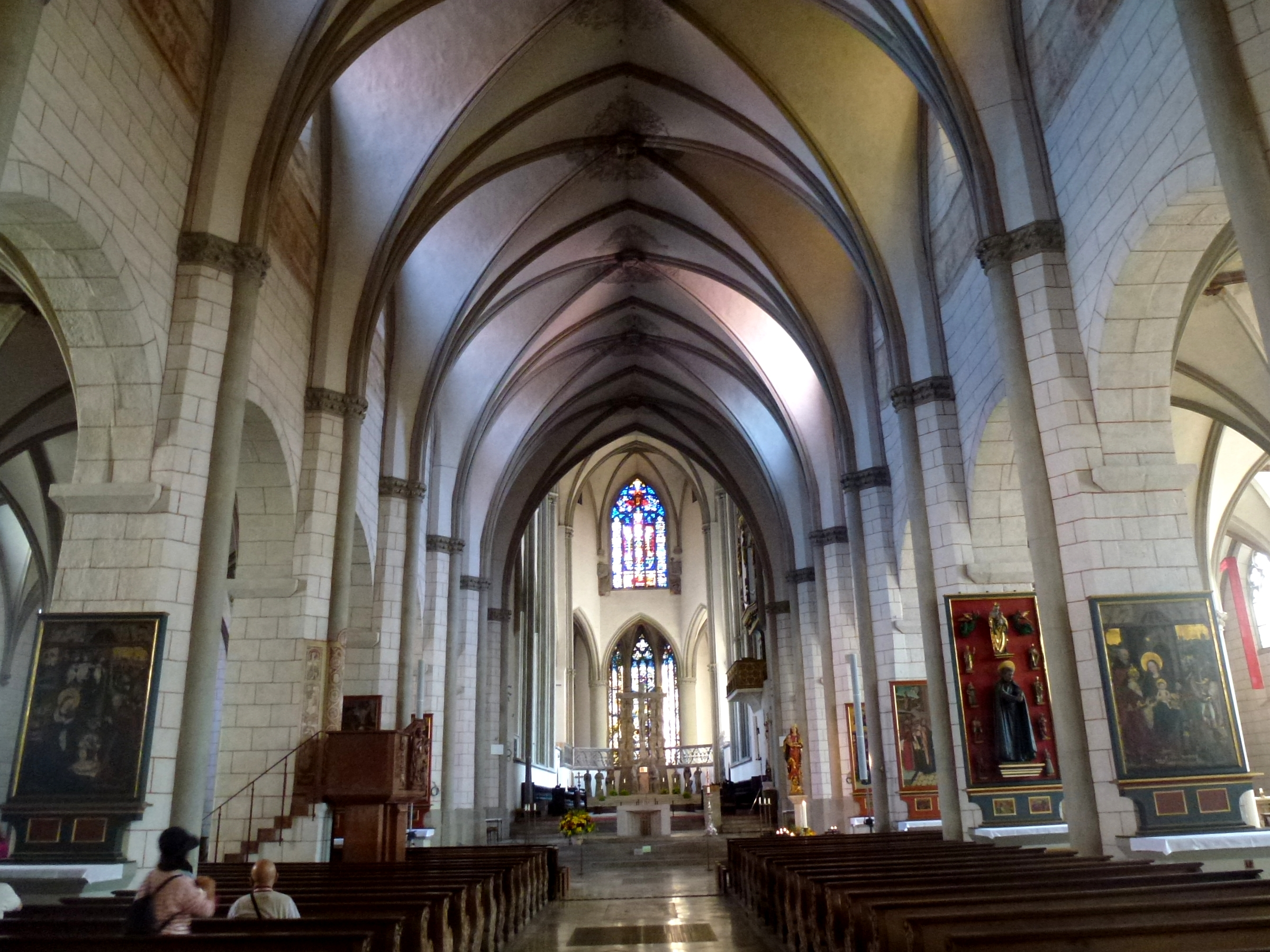 Hohe Dom Augsburg Germany